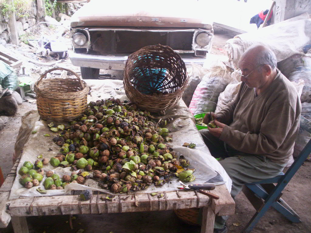 Descascarado de nueces en Rincón, Depto. Pomán, Catamarca.